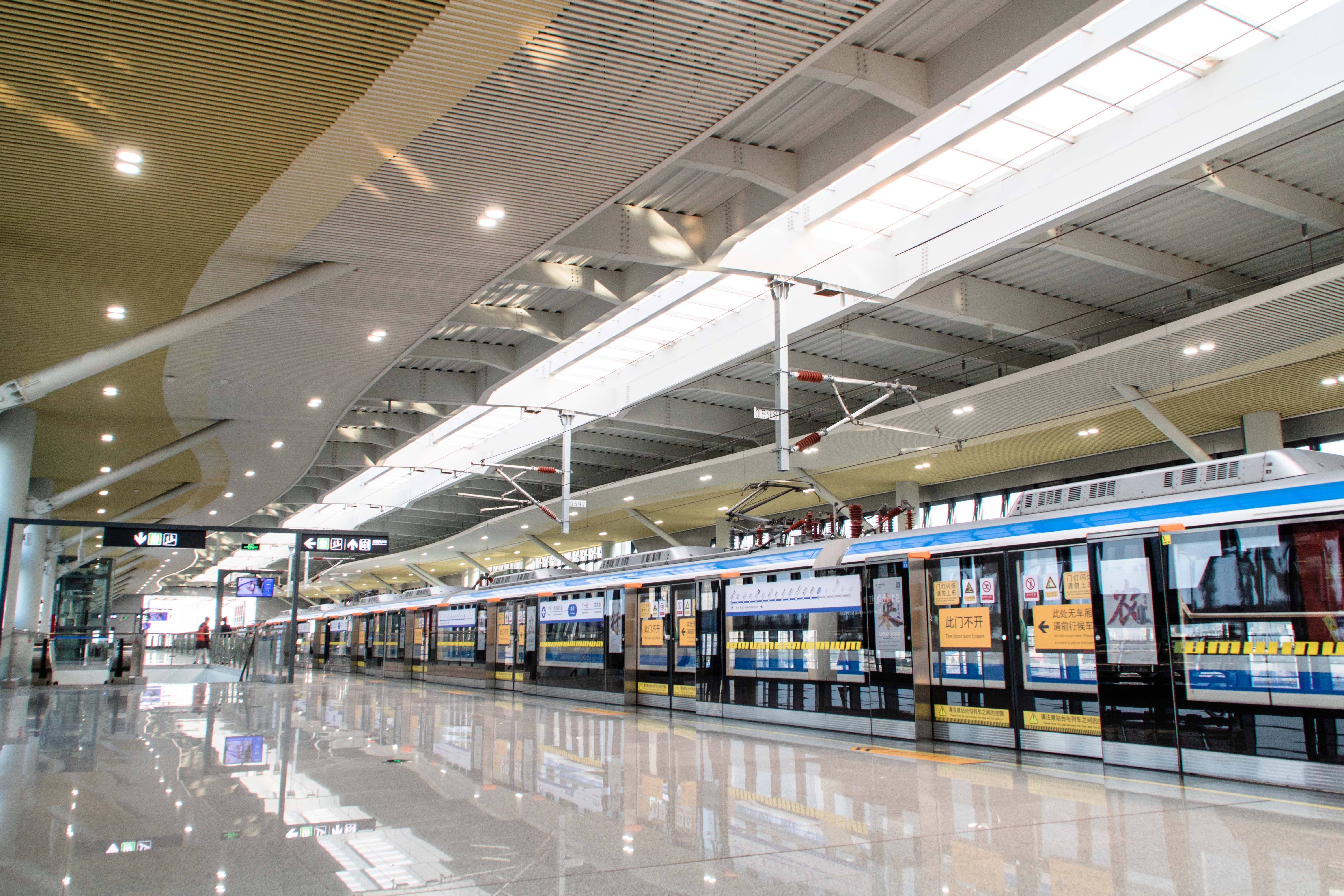 中文（中国大陆）: 德政站站台